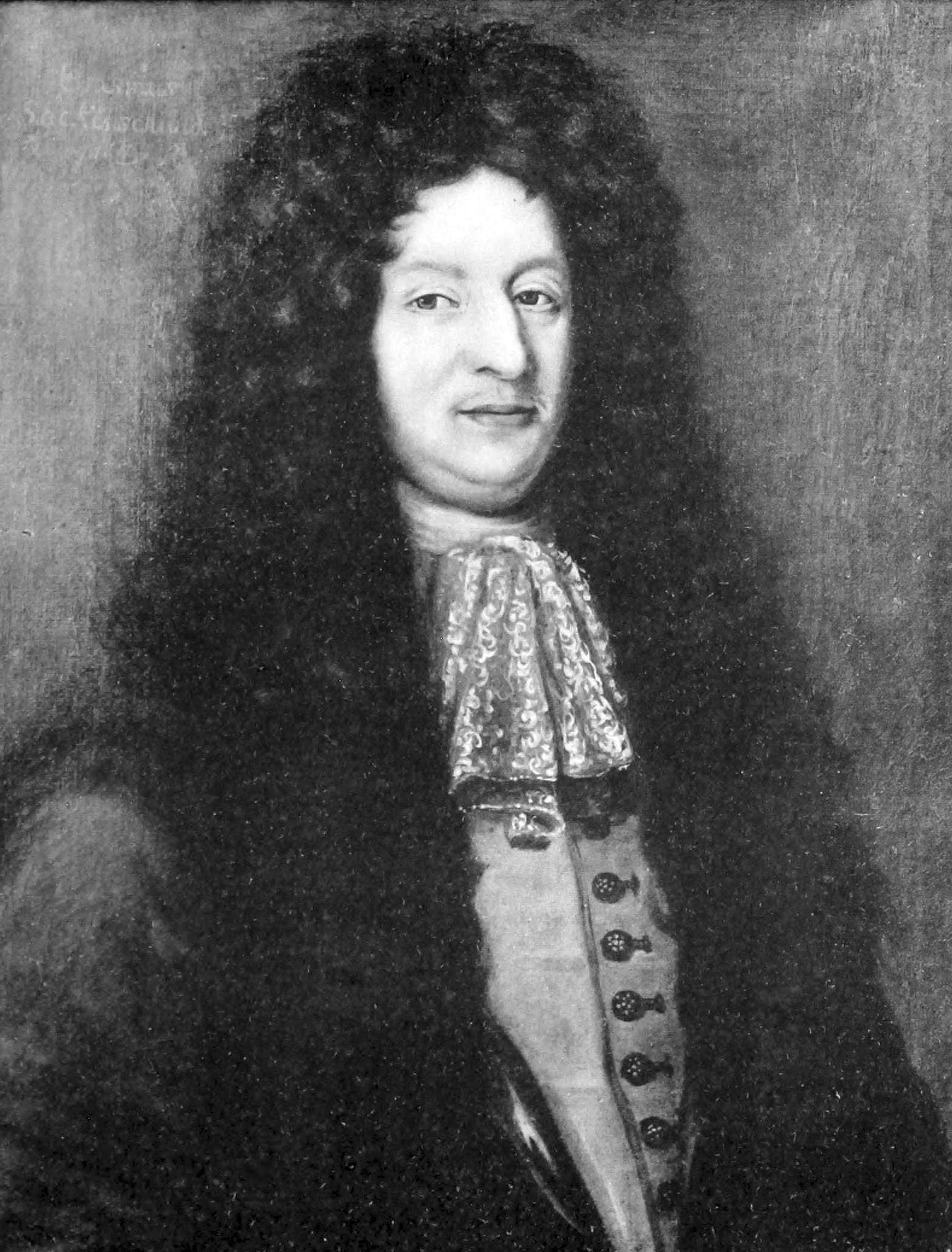 Erasmus Sack (1633-1697). Medelålders man, bröstbild, fas t. v., med lång svart allongeperuk, hvit lindad halsduk med nedhängande spetsändar, hvit rock med förgyllda knappar, knäppt, brunt draperi med rödt foder. Bakgrund olivgrå. Uppe t. v. står: Erasmus Sacken-schiöld M. D. Olja på duk, 81x72 ctm., kopia af Kasper Kenckel. Medicinalstyrelsen. Eich. o 62. PI. XV. — Enligt Collegii Medici Cassabok 1704—1761 betaltes den 20 maj 1707 “åt H:r Casper Kenkel för copian af H:r D:r Sackenschiölds portrait 24 dir kmt.“